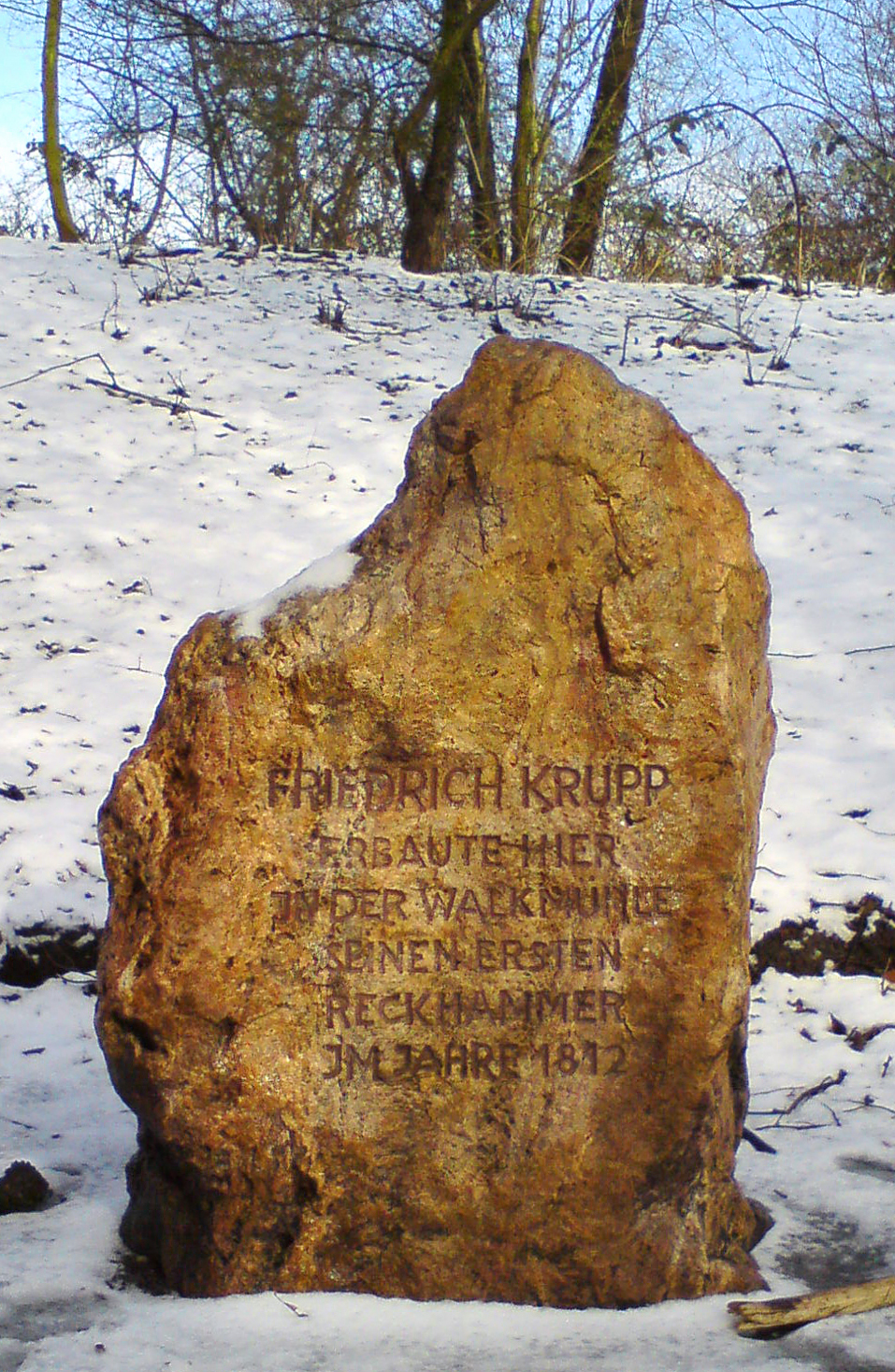 Dieses Foto zeigt ein Denkmal.An der Walkmühle erbaute Friedrich Krupp seinen ersten Reckhammer